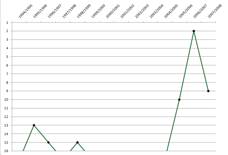 GKS Bełchatów w Ekstraklasie